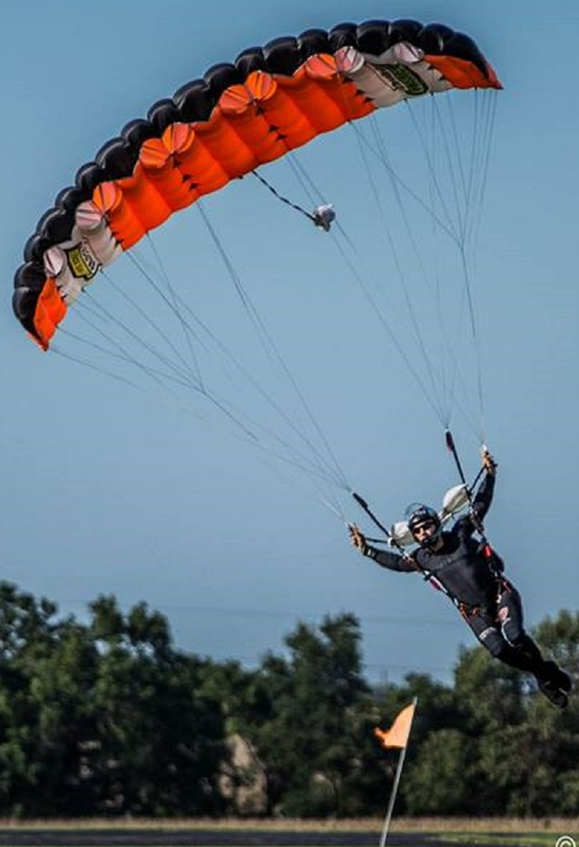 Добромир Славчев инструктор по парашутизъм